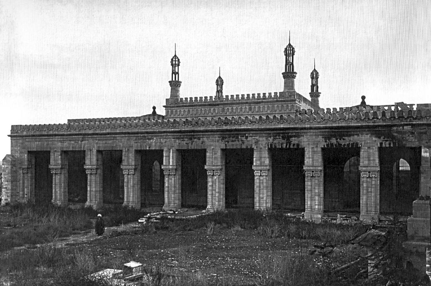 Cümə məscidinin ümumi görünüşü 1918-ci ildə ermənilər tərəfindən törədilmiş yanğından sonra, məscidin qabağında Axund Hacı Şıx Həbib